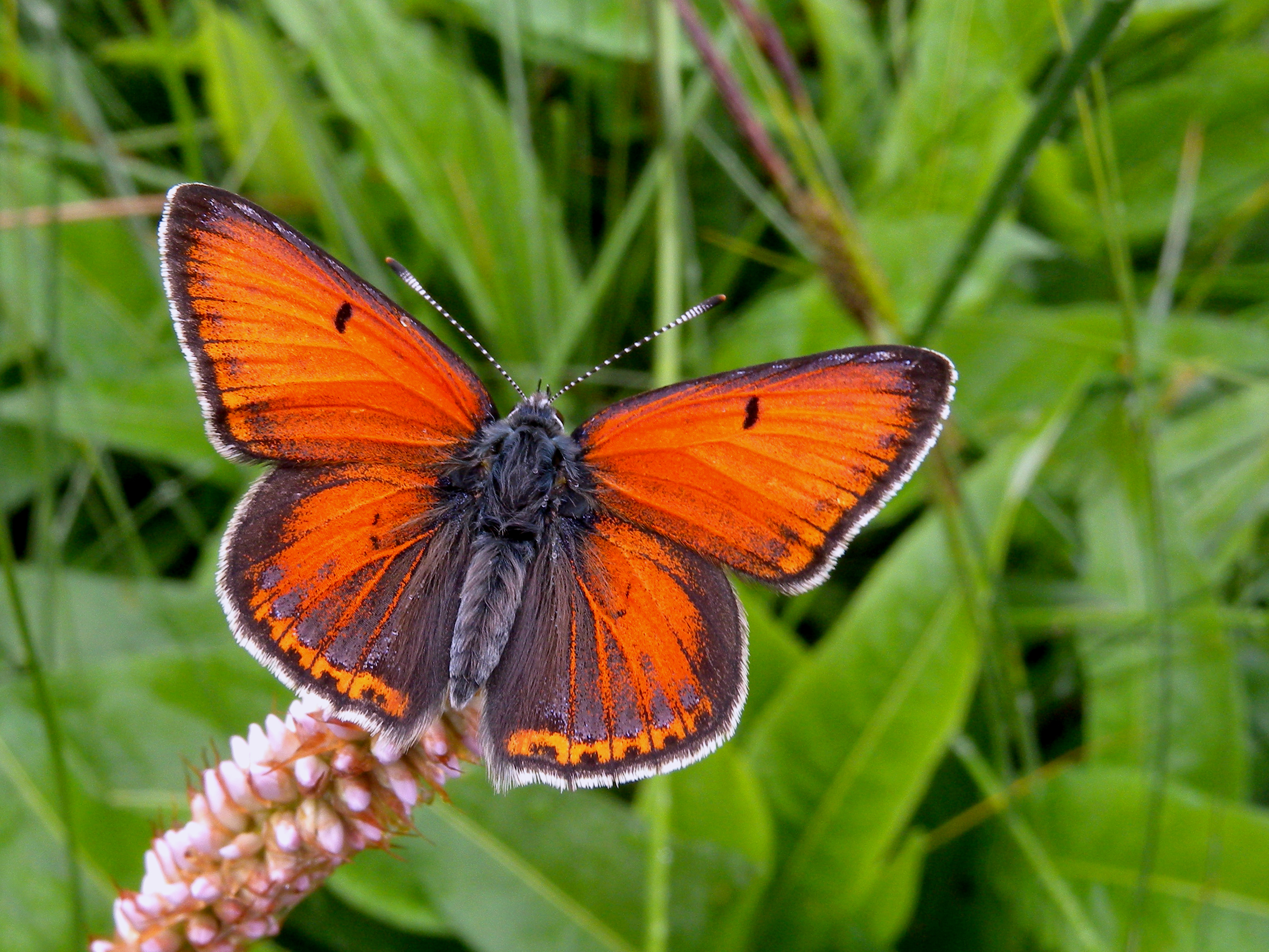 Kleiner Ampferfeuerfalter, Emmels, Ostbelgien